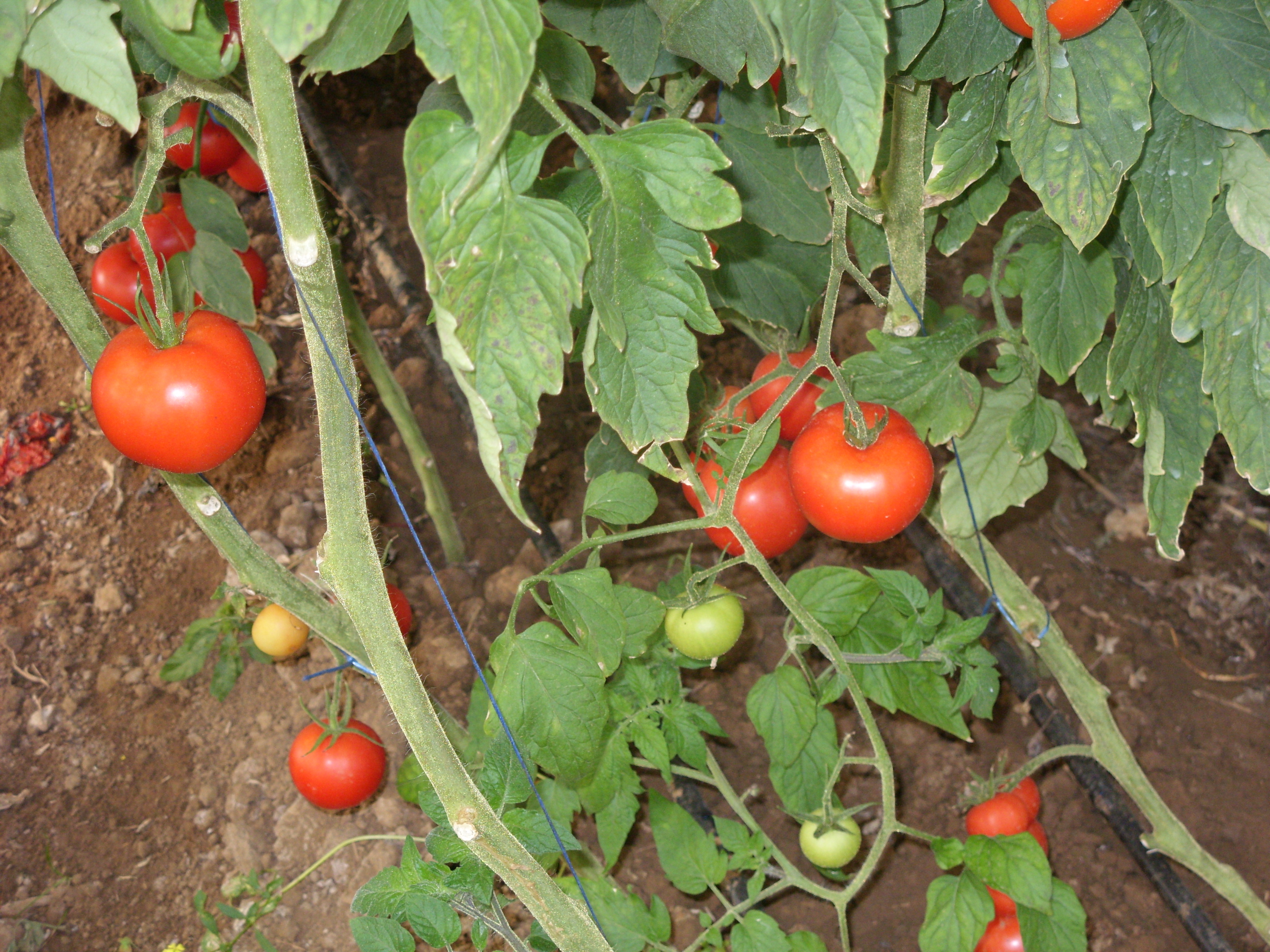 AKCAY DOMATESİ